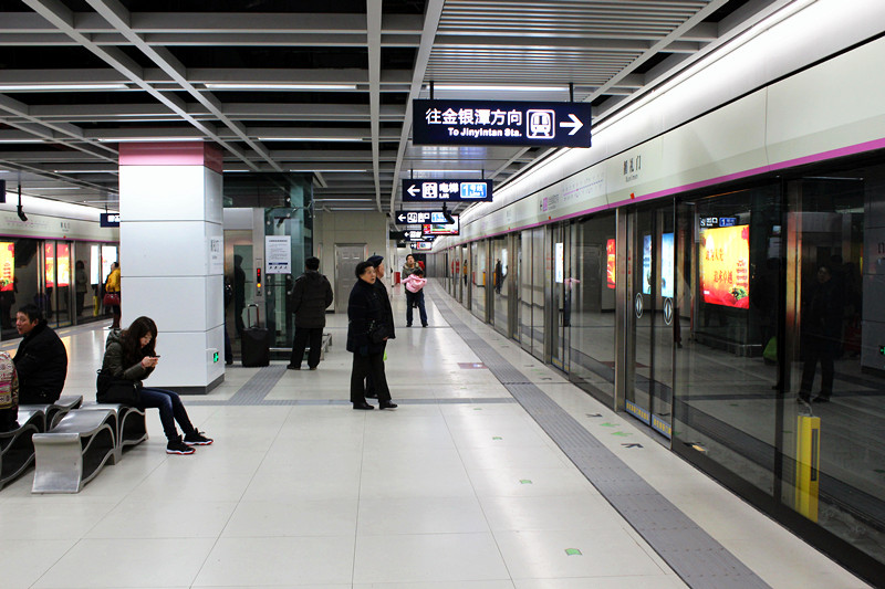 中文（中国大陆）: 武汉地铁2号线